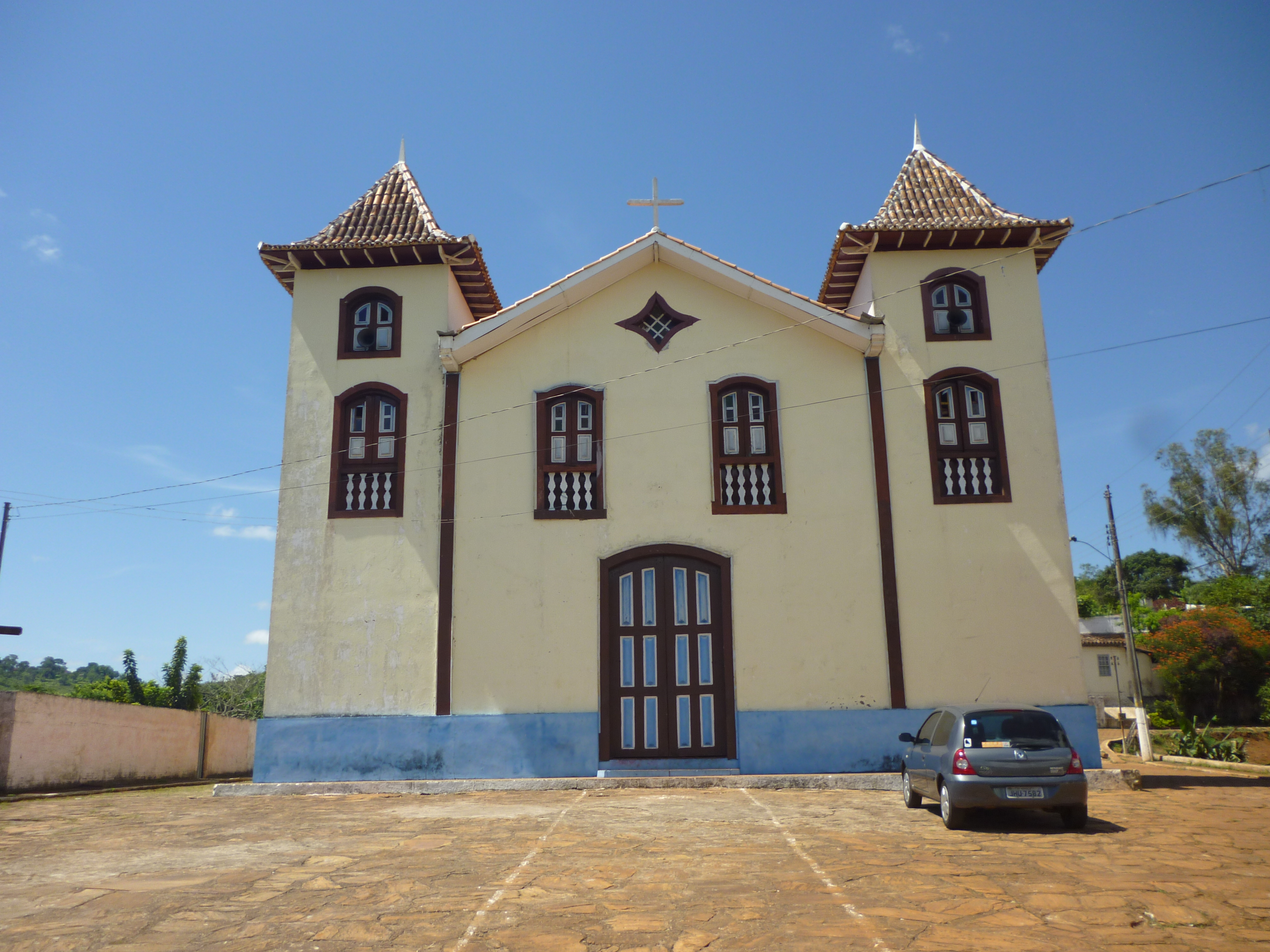 Santo Antonio do Itambé MG Brasil - Igreja de Santo Antonio